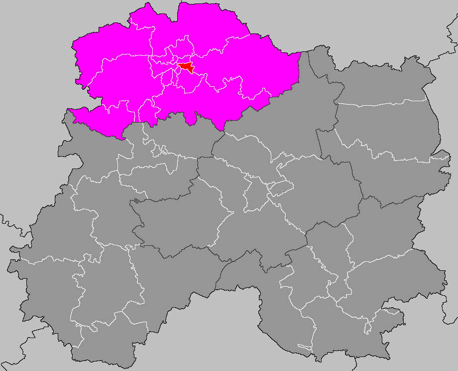 Localisation du canton de Reims-6